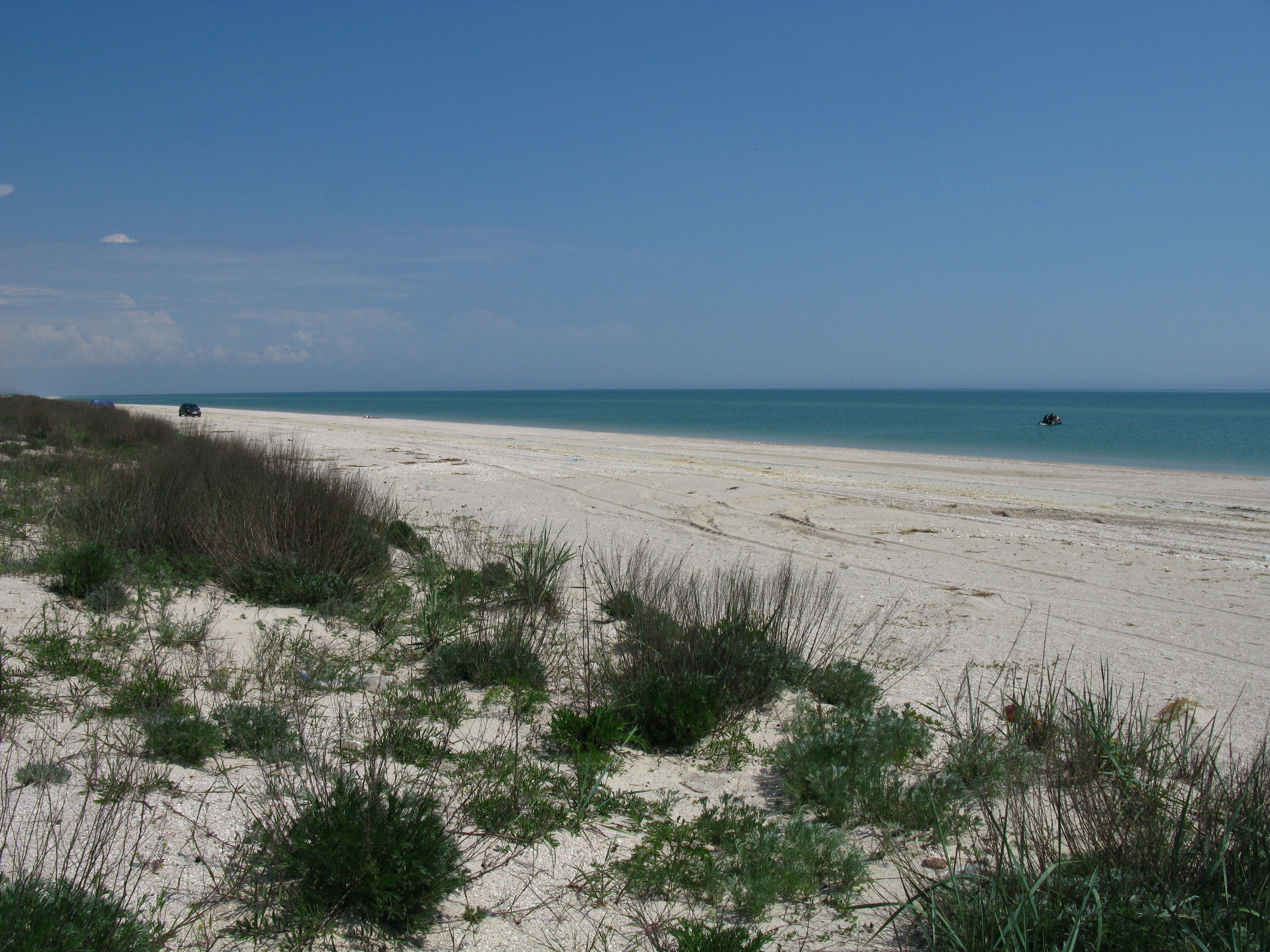 «Коса Федотова», Якимівський р-н, на захід від смт Кирилівка, півострів Азовського моря